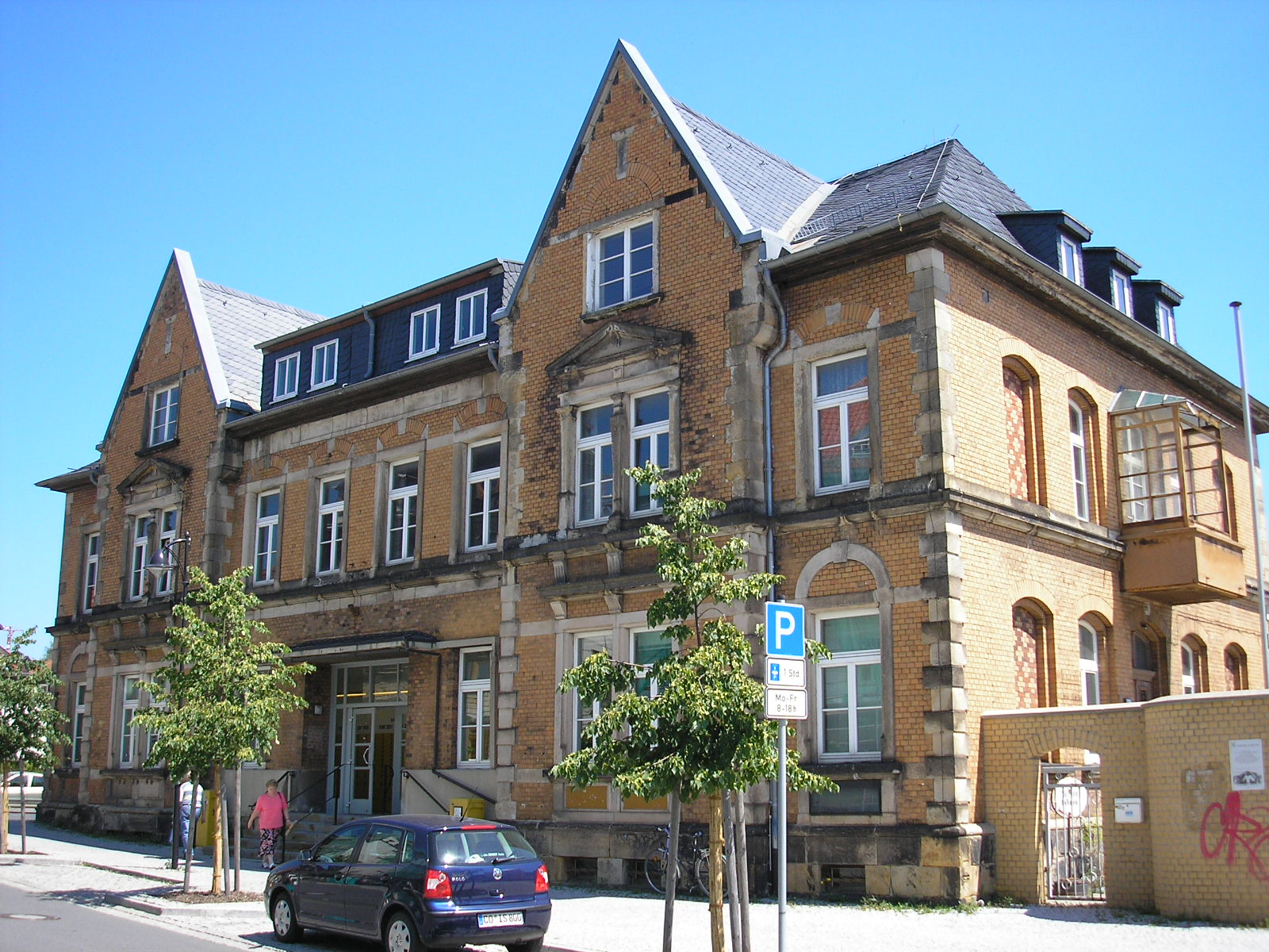 Postgebäude von Ilmenau (Thüringen). Sitz der Ilmenauer Post zwischen 1880er-Jahren und 2003.